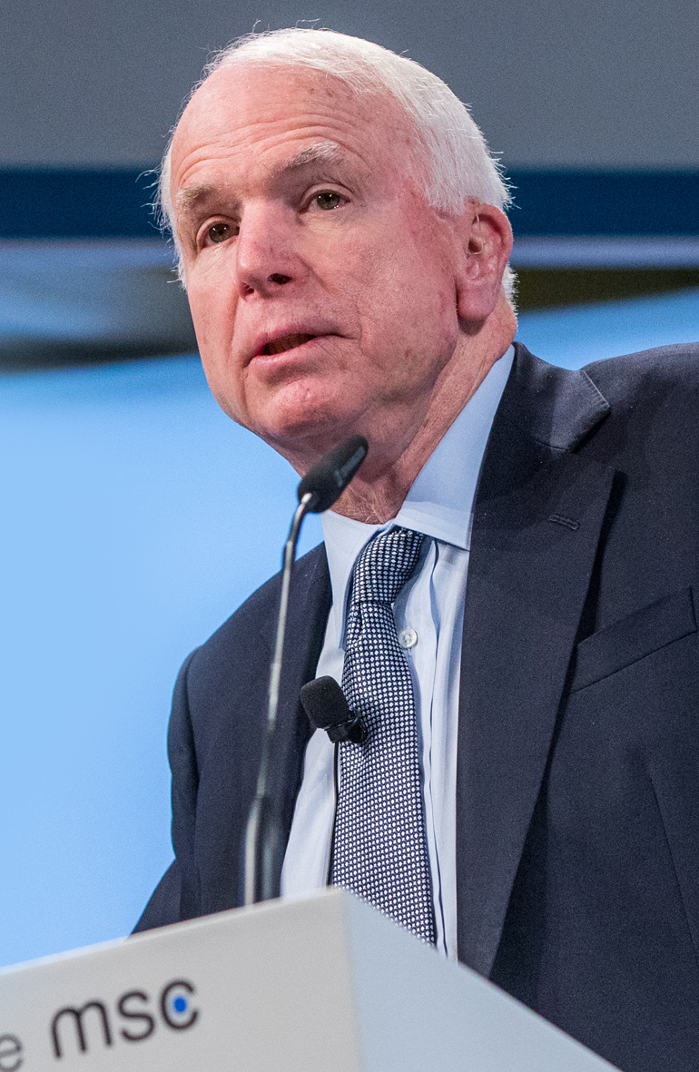 John McCain währen der Münchner Sicherheitskonferenz 2016